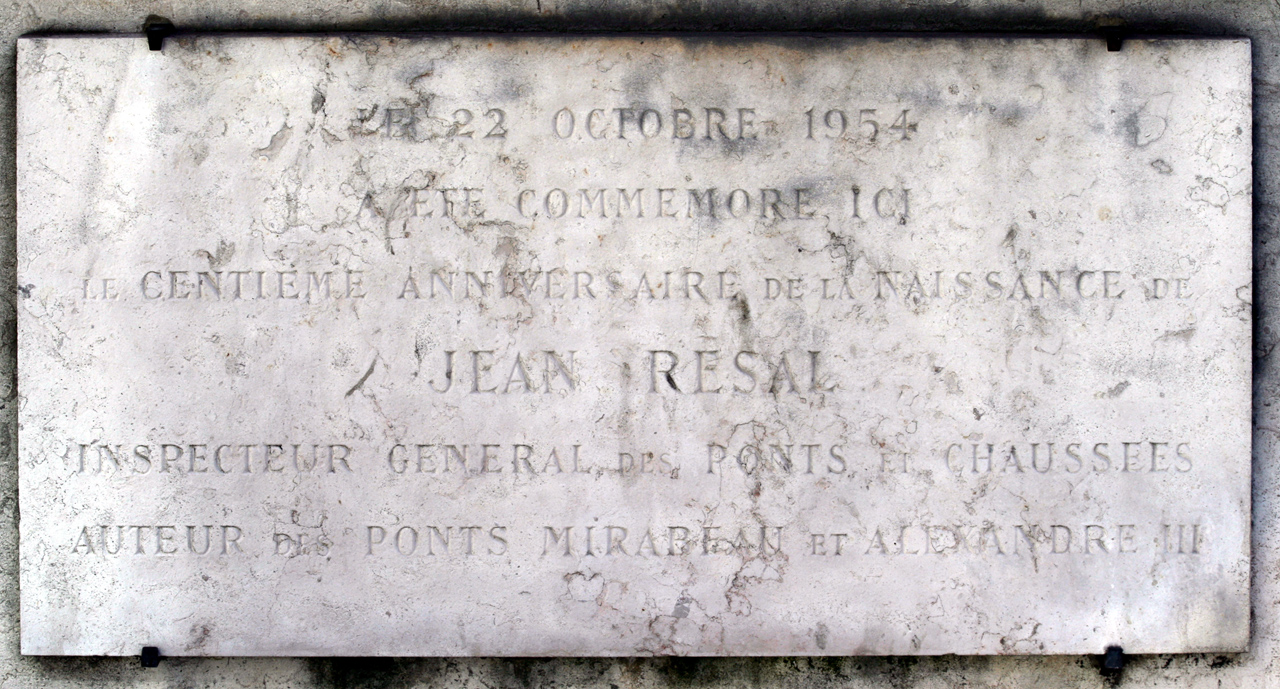 Plaque commémorative apposée sur la paroi du pont Mirabeau donnant sur le quai Louis-Blériot, Paris 16e.